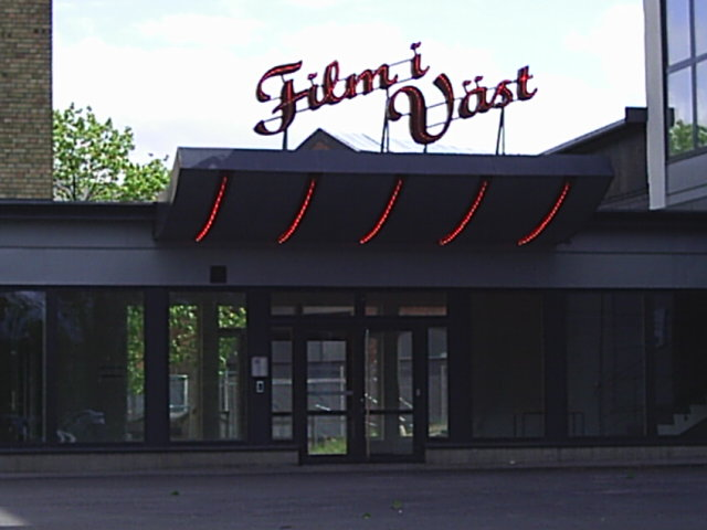 Entrén till Film i Västs lokaler i Trollhättan. Fotograf: Tubaist